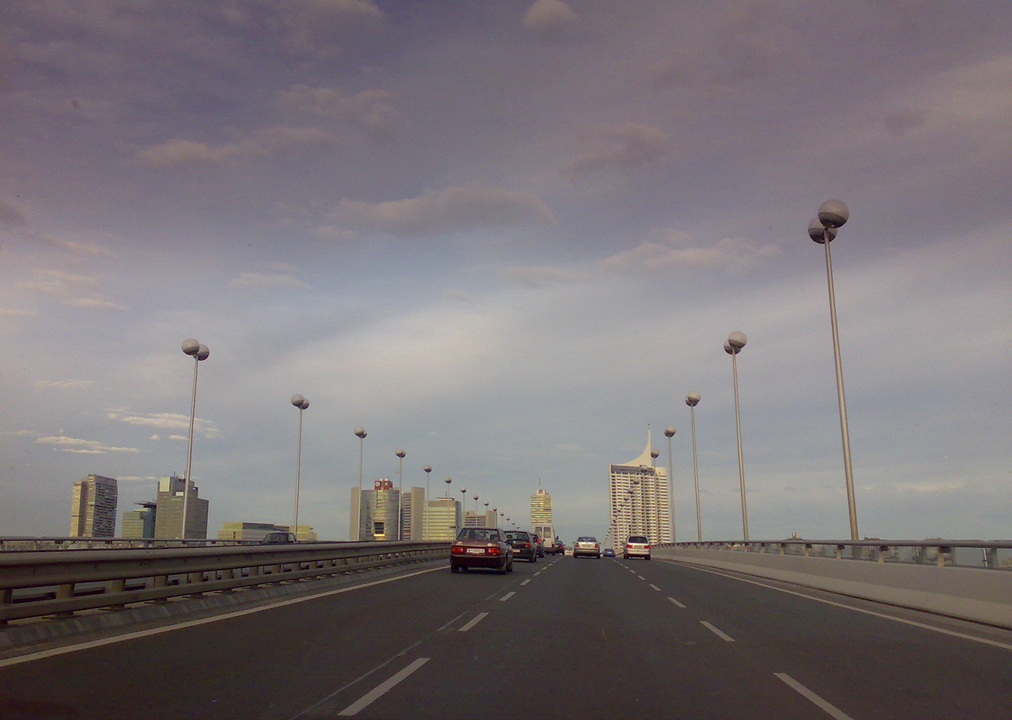 Reichsbrücke, Richtung Norden fahrend